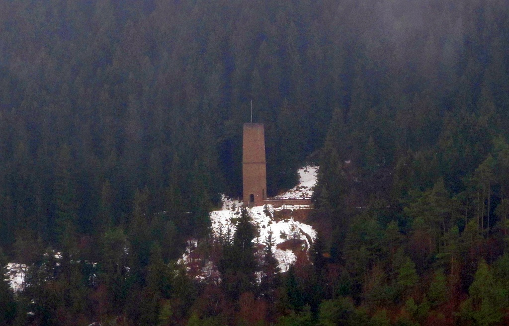 denkmalgeschützter Rauchgaskamin am Bastenberg, Bestwig-Ramsbeck (Germany)